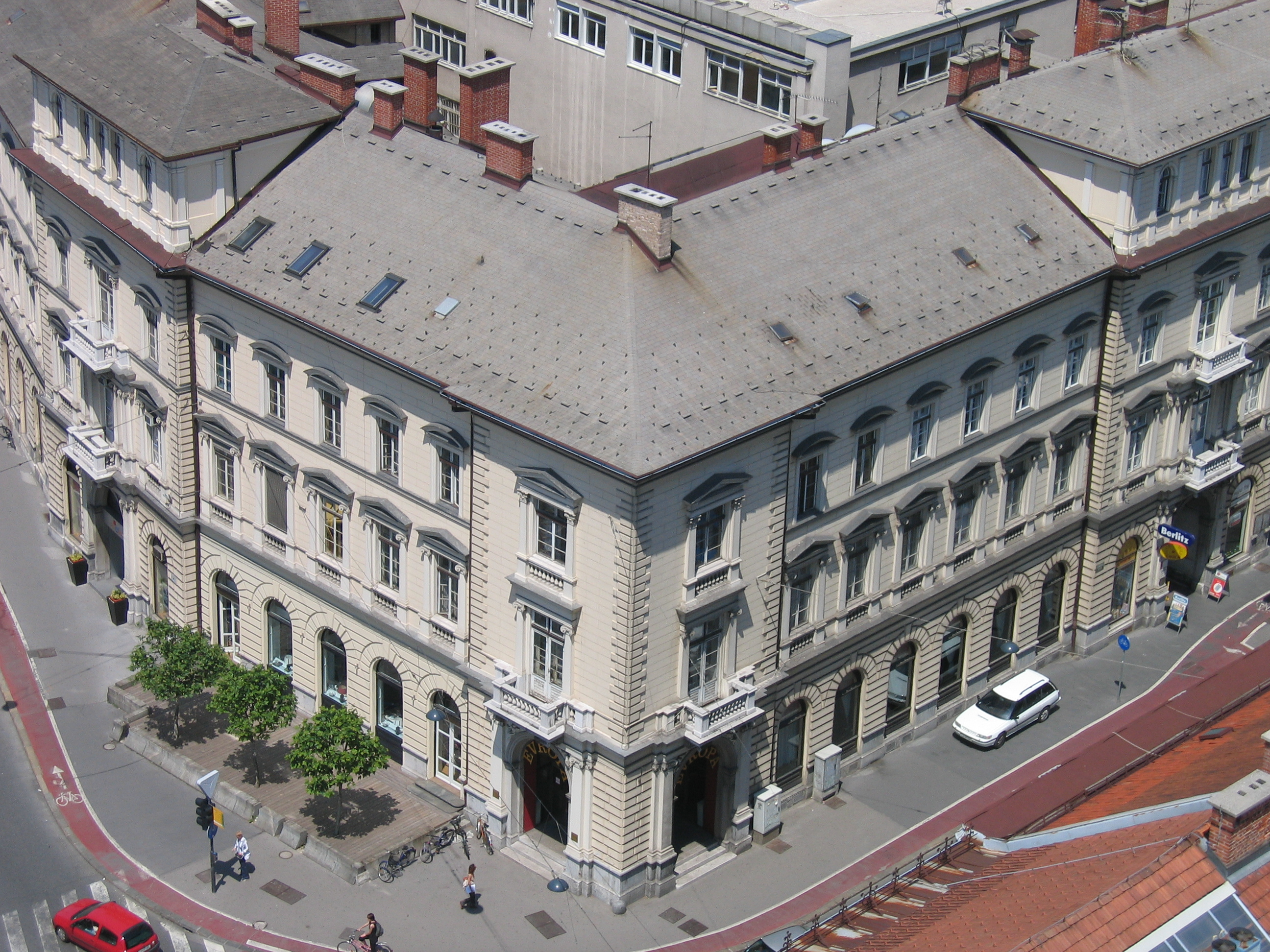 Knjižnica Otona Župančiča v Ljubljani